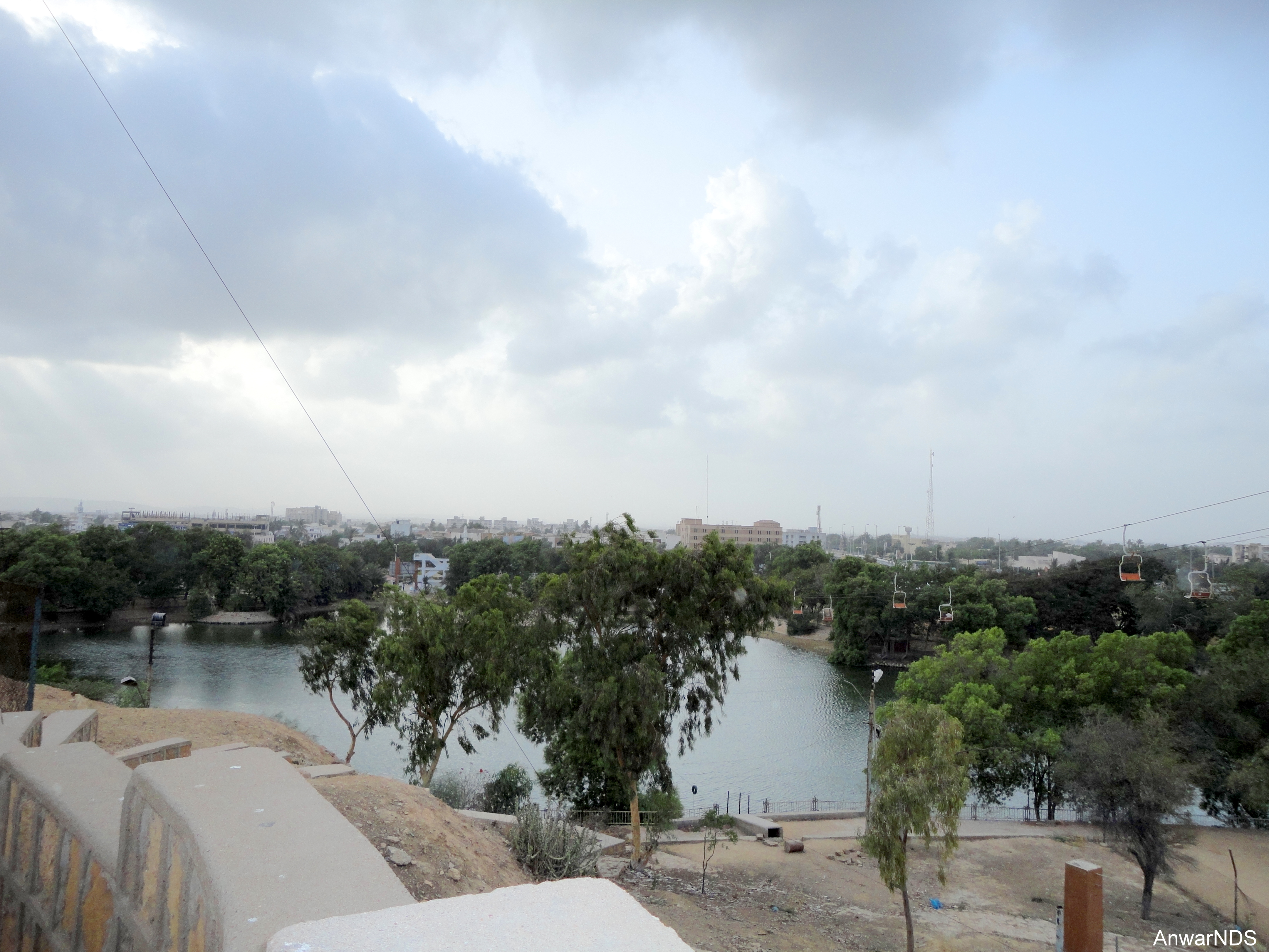 Safari Park Karachi 12